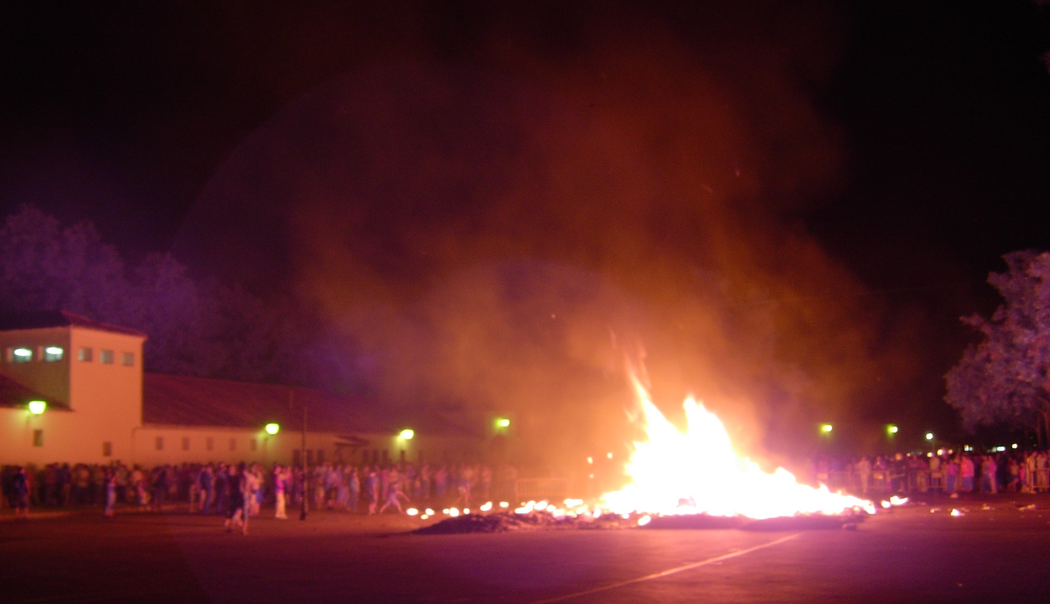 Hoguera de San Juan en los Ejidos de la Feria de Albacete, el 23 de junio de 2008.